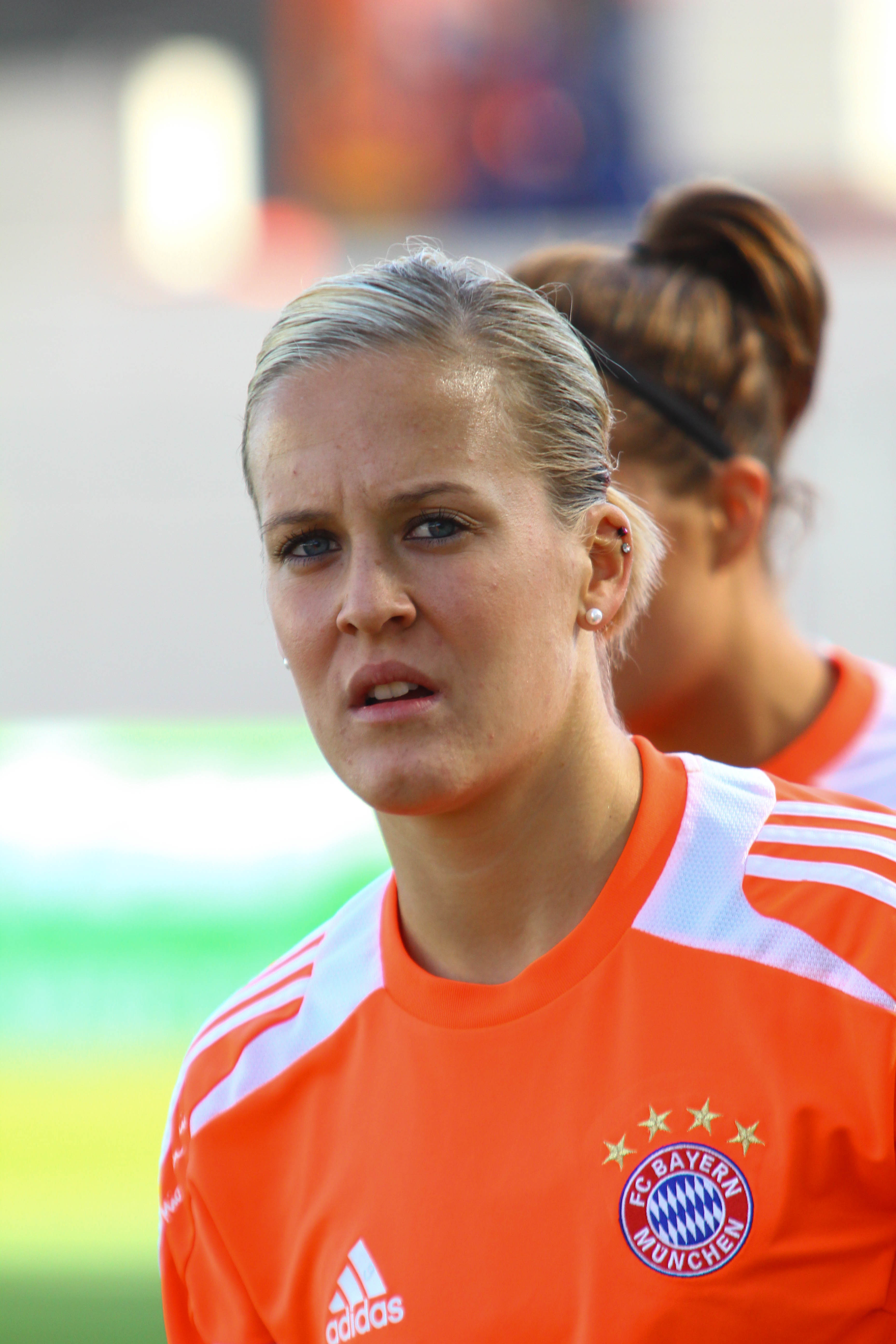 Swiss footballer Vanessa Bürki, FC Bayern München